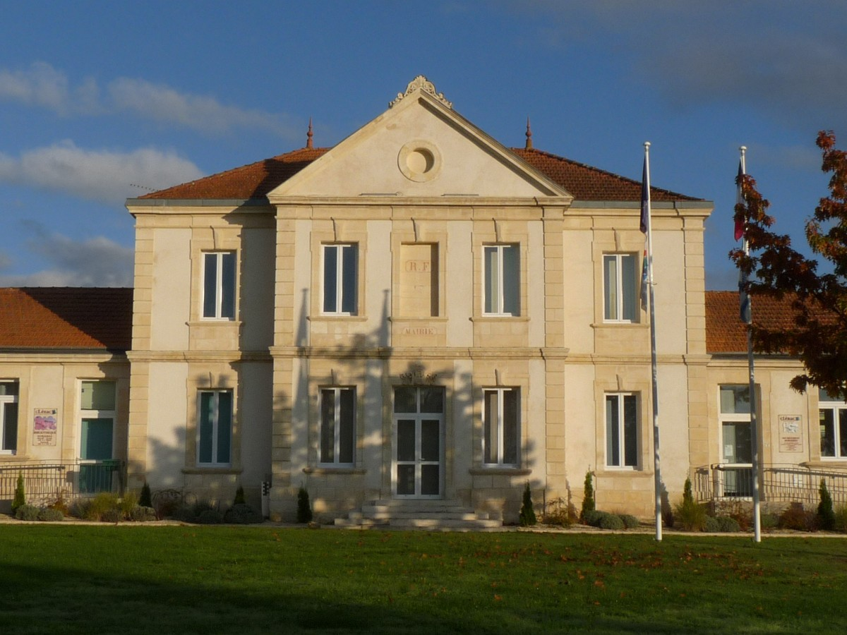 Mairie de Clérac, Charente-Maritime, France